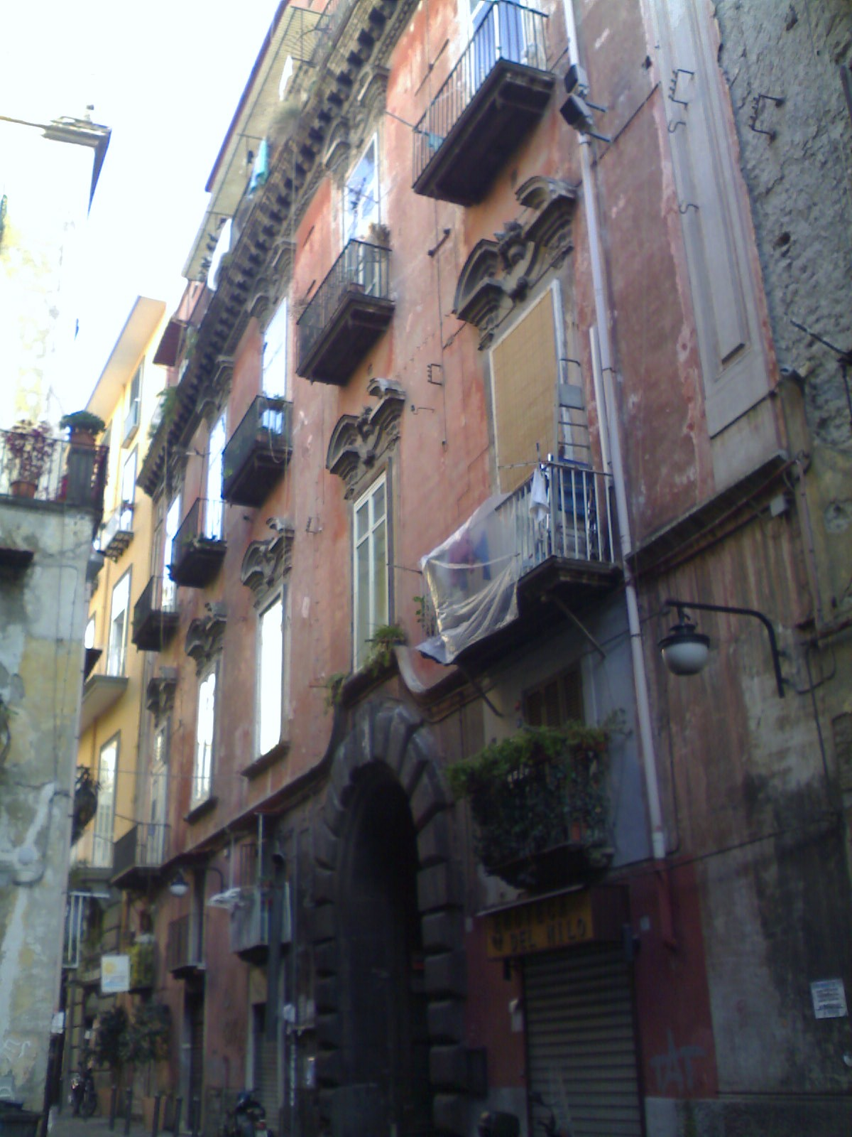 Palazzo in via G.Paladino (Napoli)